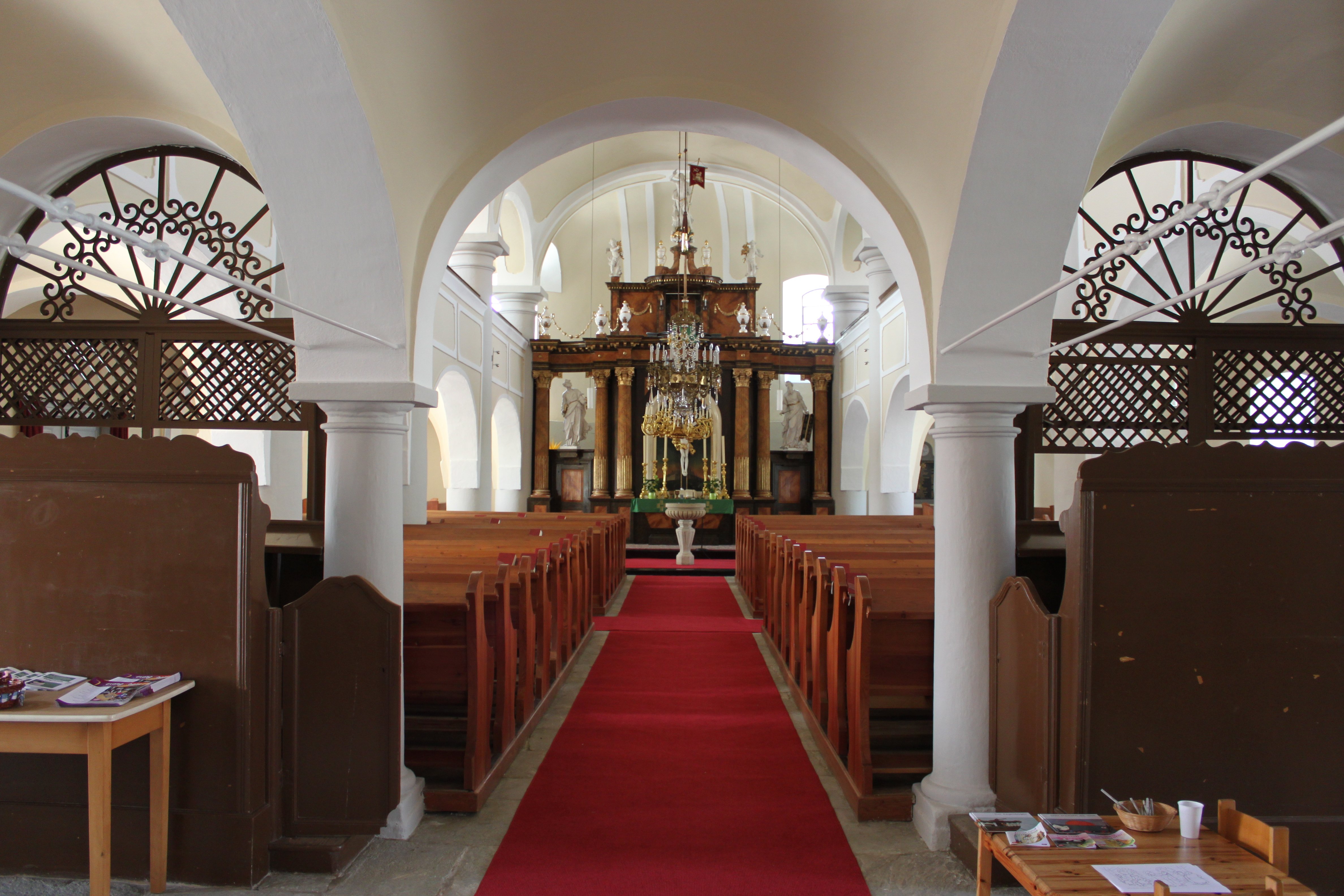 Evang. Pfarrkirche A.B.